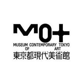 Logo des MMuseum of Contemporary Art Tokyo